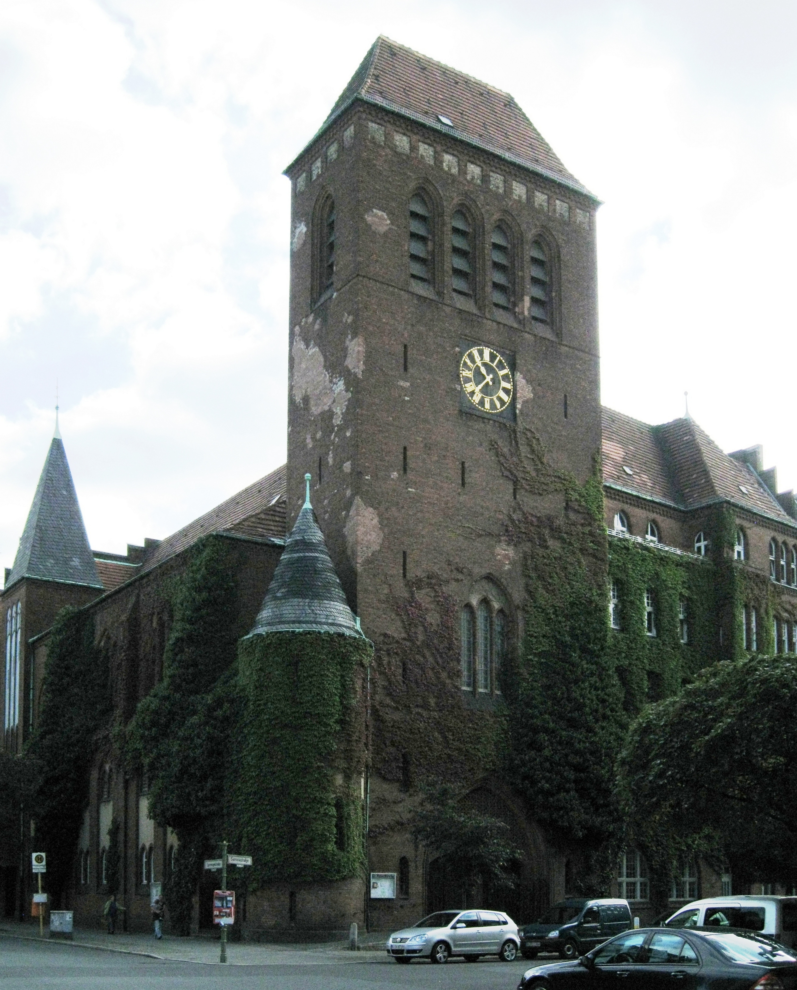 Osterkirche in Berlin-Wedding